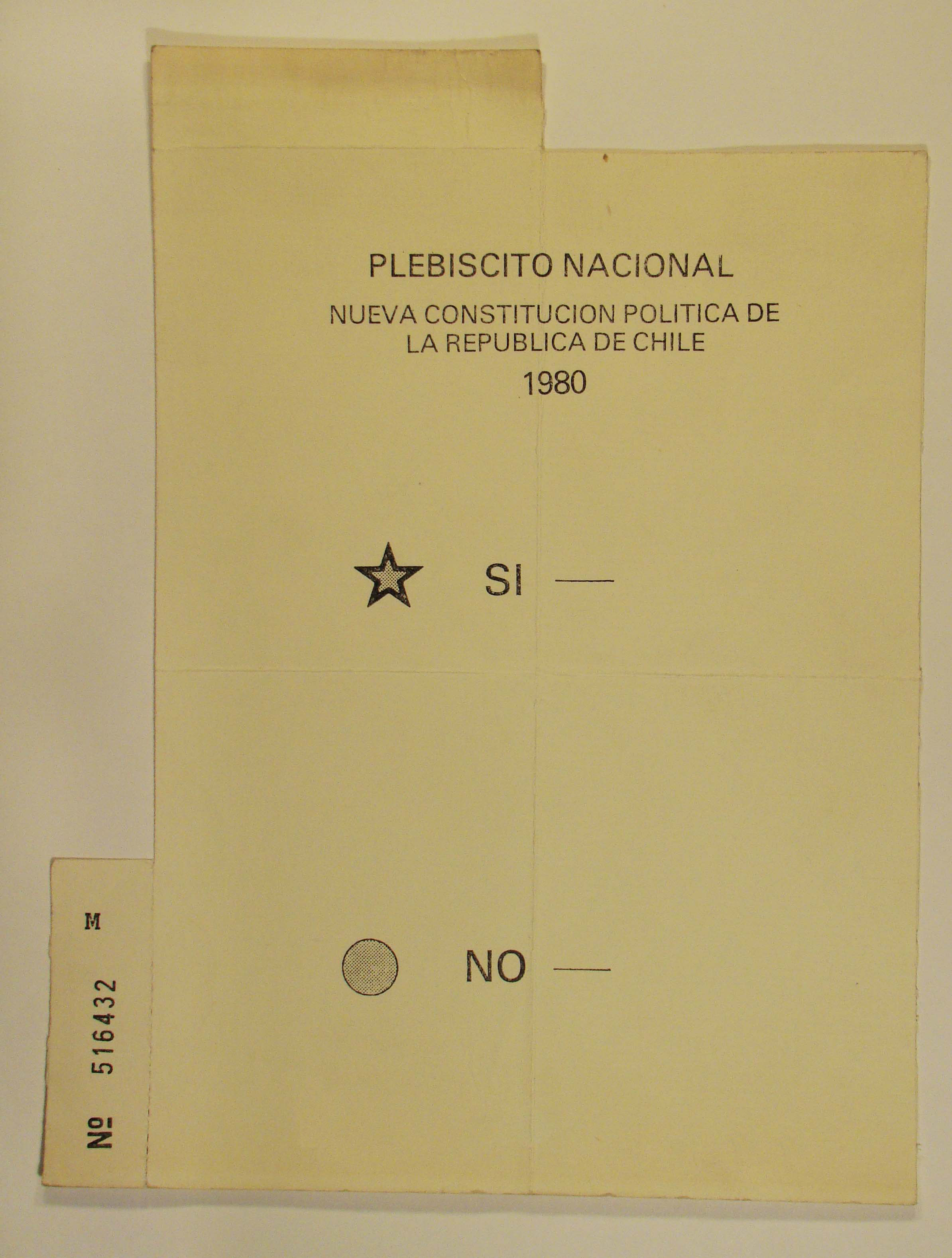 Documento de la época del Regimen militar de Augusto Pinochet en Chile